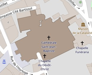 Situation de l'ancien presbytère de Perpignan This map may be incomplete, and may contain errors. Don't rely solely on it for navigation.